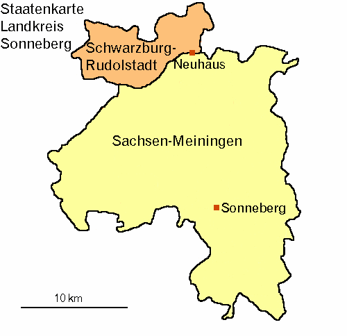 Staatenaufteilung des heutigen Landkreis Sonneberg bis 1920. Quelle: selbst gezeichnet